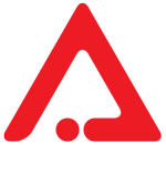 Символ Международного альянса атеистов